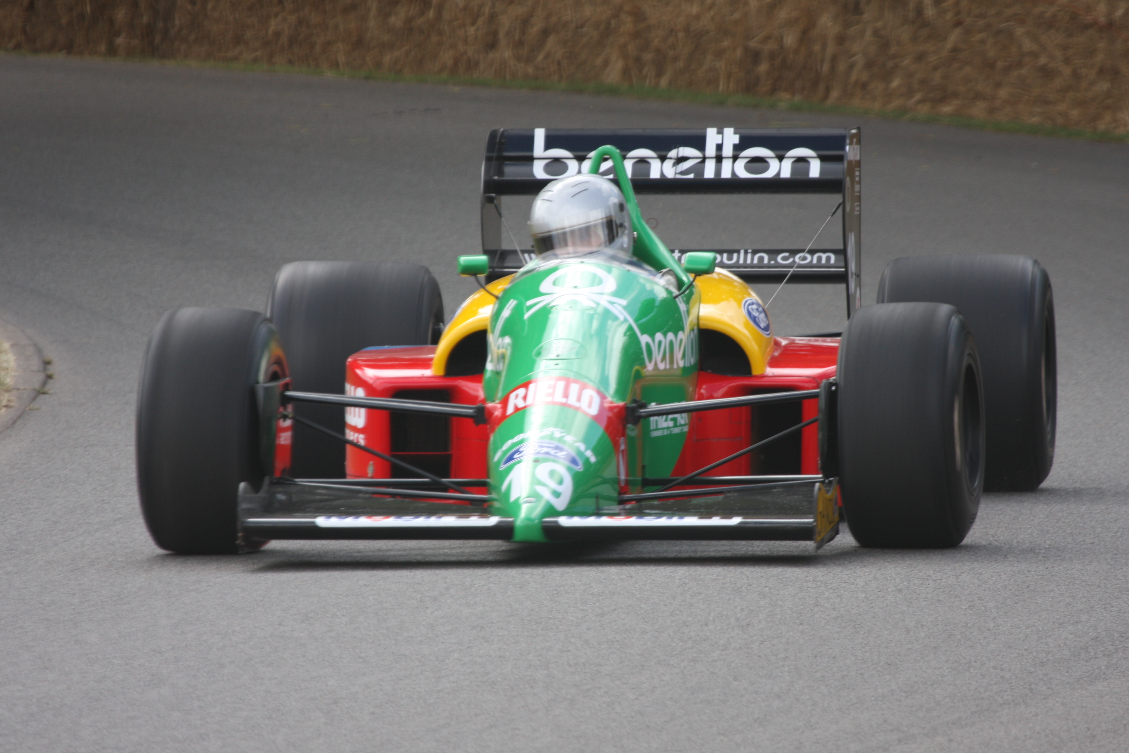 Goodwood 2009